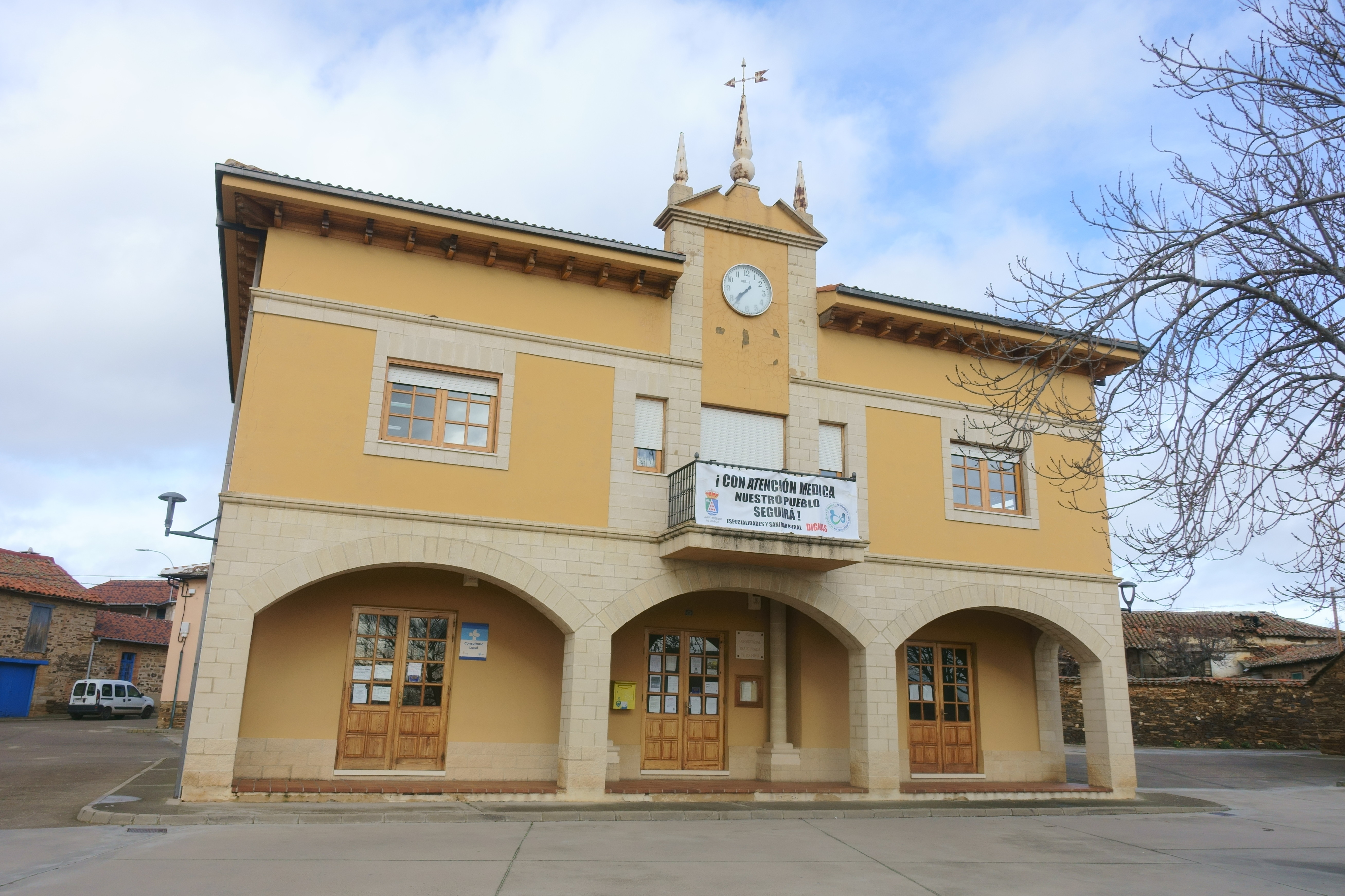 Casa consistorial de Luyego (León, España).